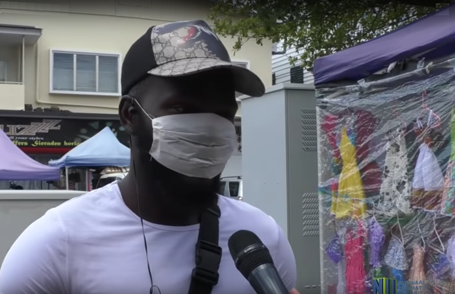 Op straat in Paramaribo tijdens Covid-19